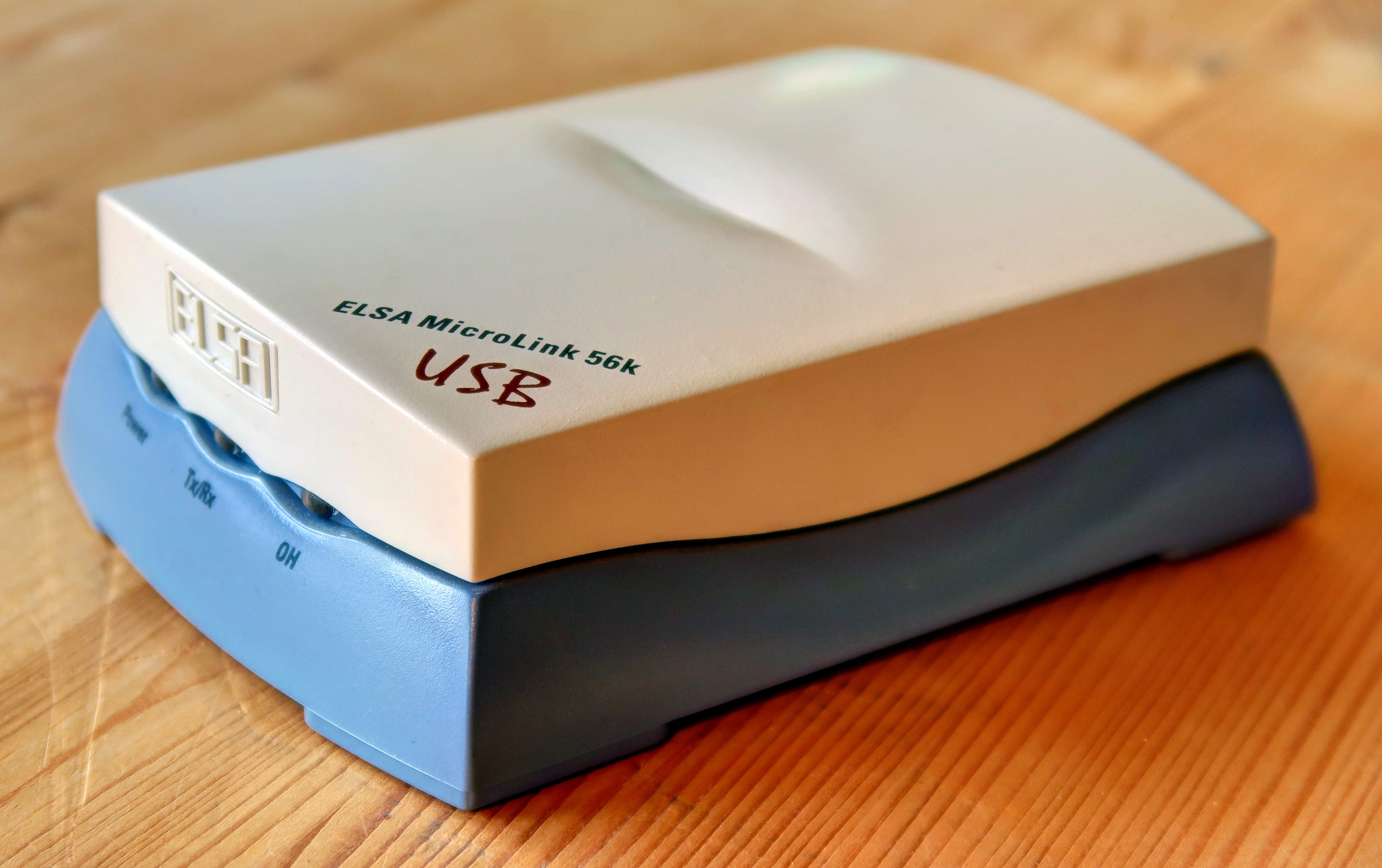 USB Modem der Firma ELSA MicroLink 56k aus dem Jahr 1999, Made in France, LxBxH im cm 12,5x9,5x3,8